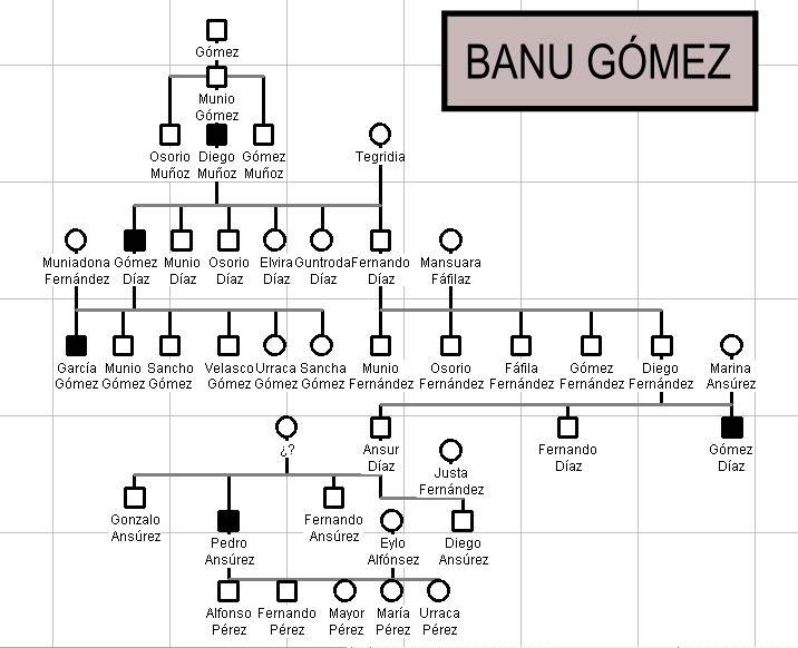 Árbol genealógico del linaje Banu Gómez. El árbol esta centrado en Pedro Ansúrez, por lo que no aparecen otras ramas familiares como los descendientes del conde Munio Fernández, Gómez Díaz II o los descendientes de Gonzalo Ansúrez los infantes de Carrión del Poema de Mio Cid.